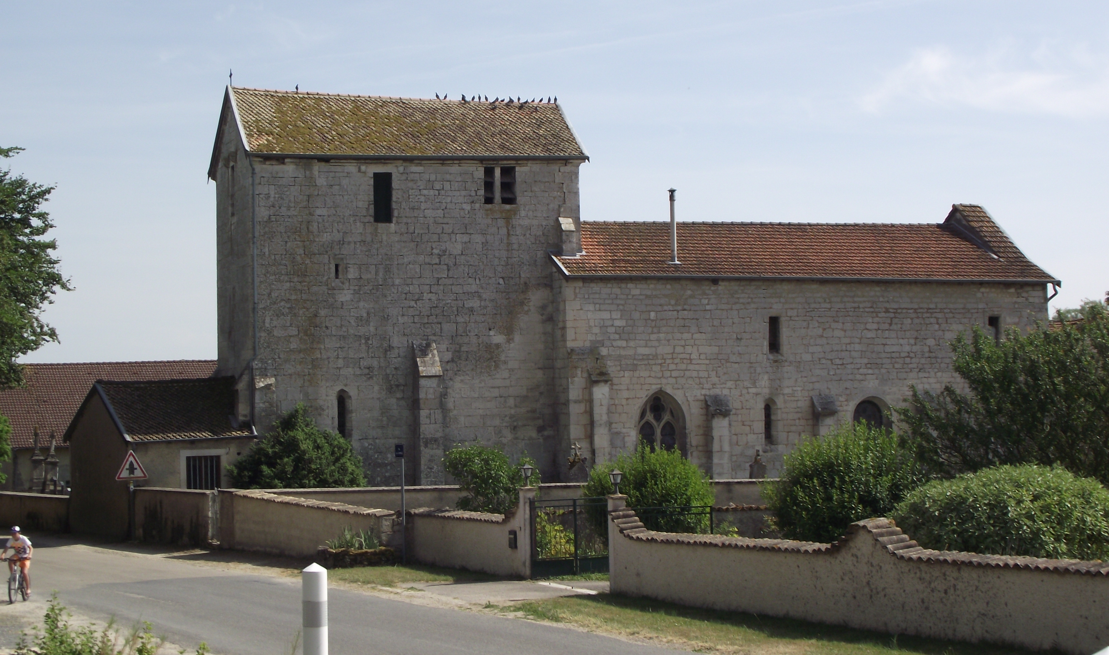 Église Saint Brice à Champougny